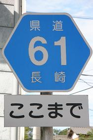 長崎県道６１号線終点